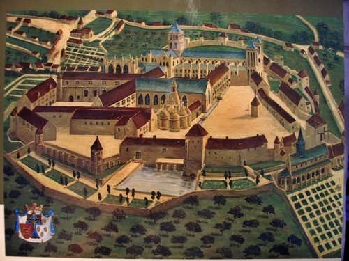 représentation de l'abbaye.